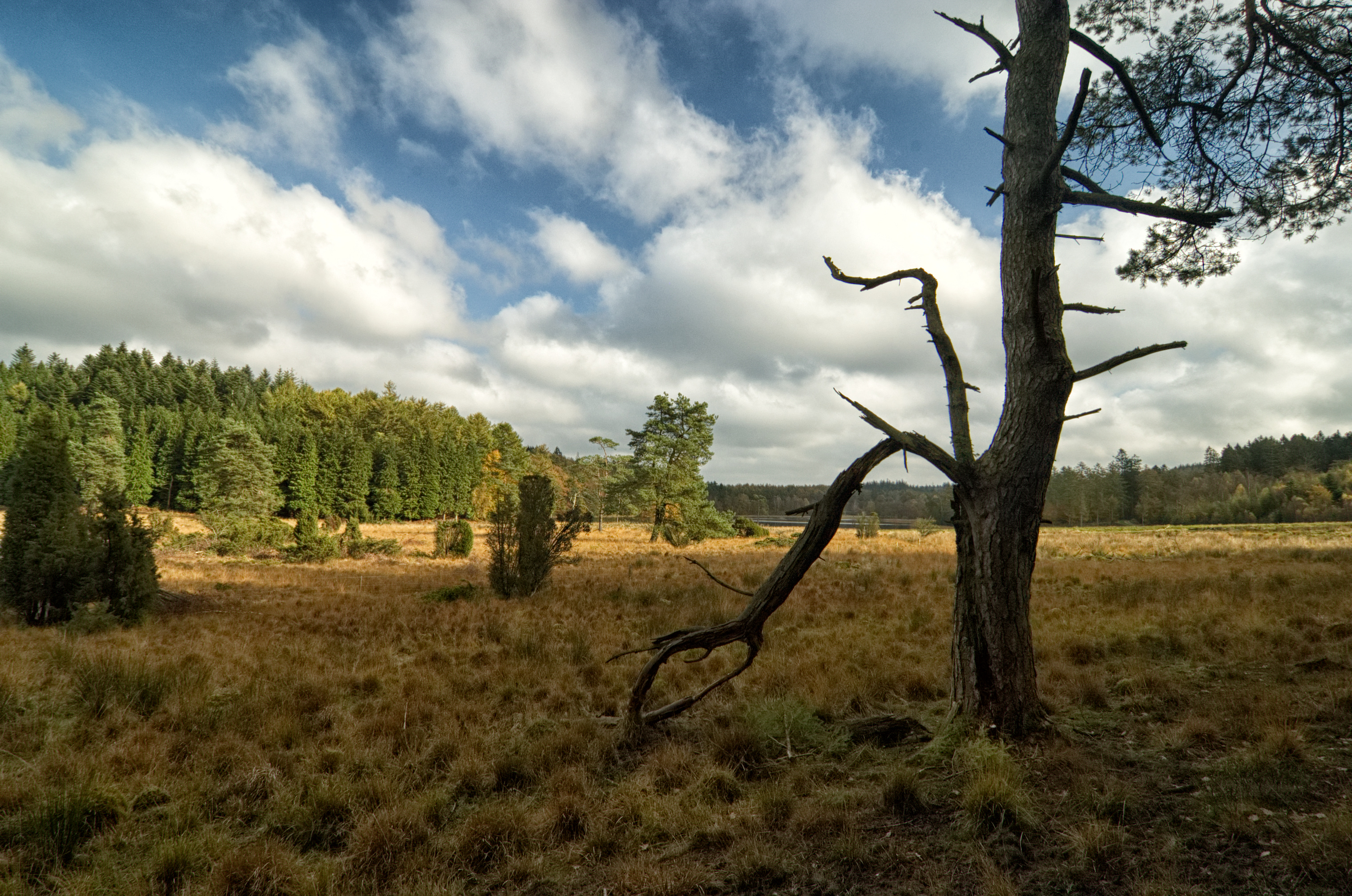 Udsigt over Langkær, en gammel højmose i Velling skov.